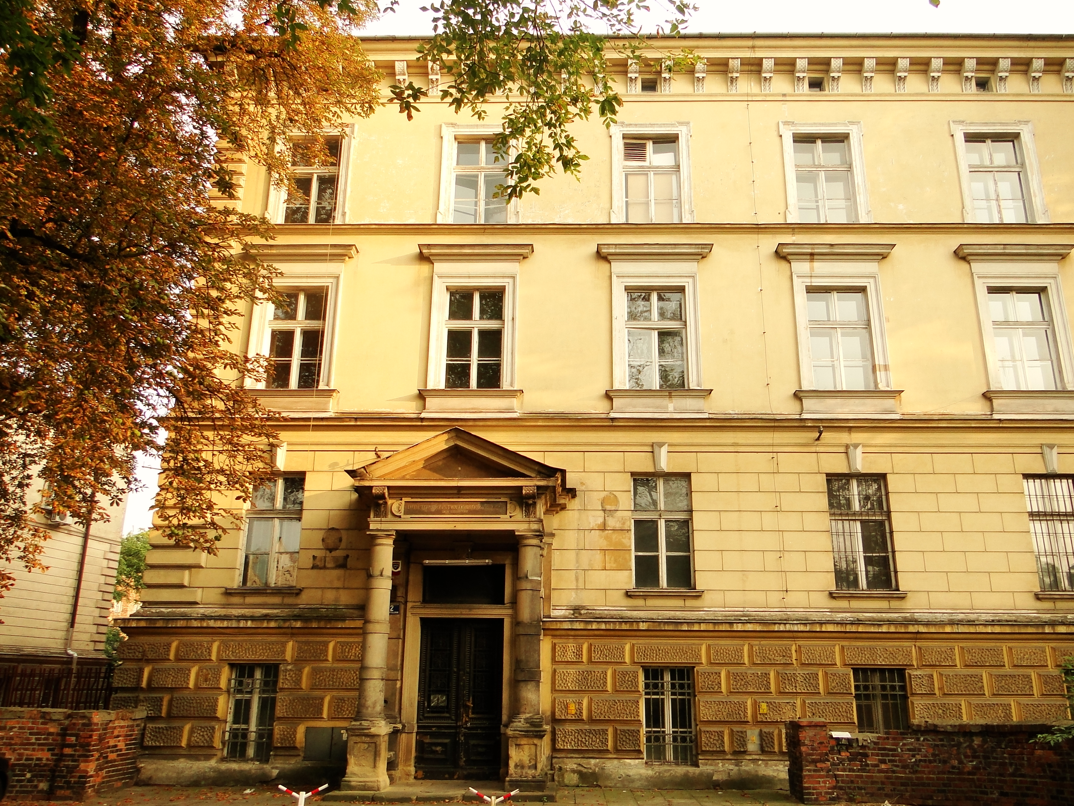 dom starców Towarzystwa Dobroczynności (d. klasztor koletek)